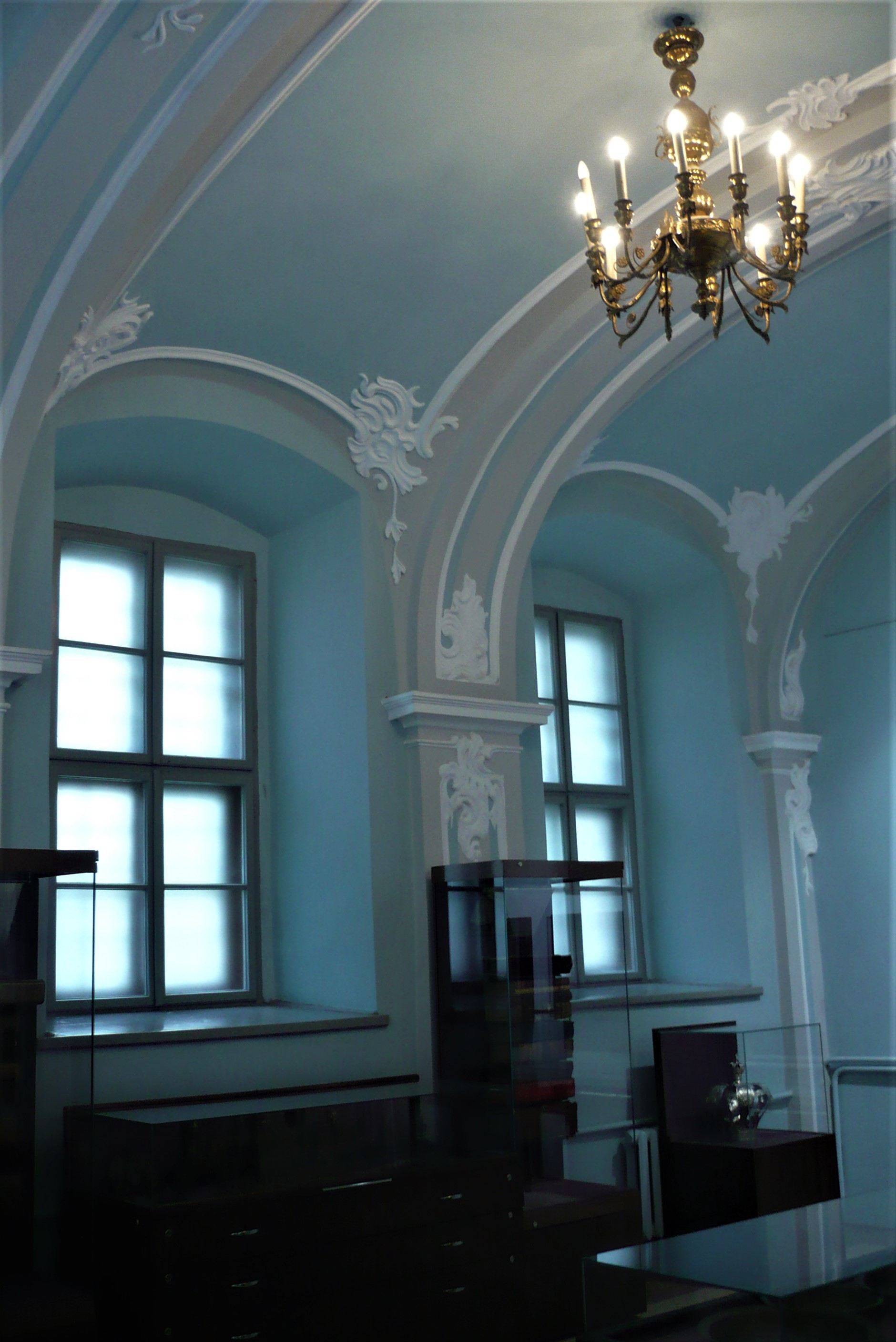 Klasztor dominikanów we Lwowie. Wnętrze